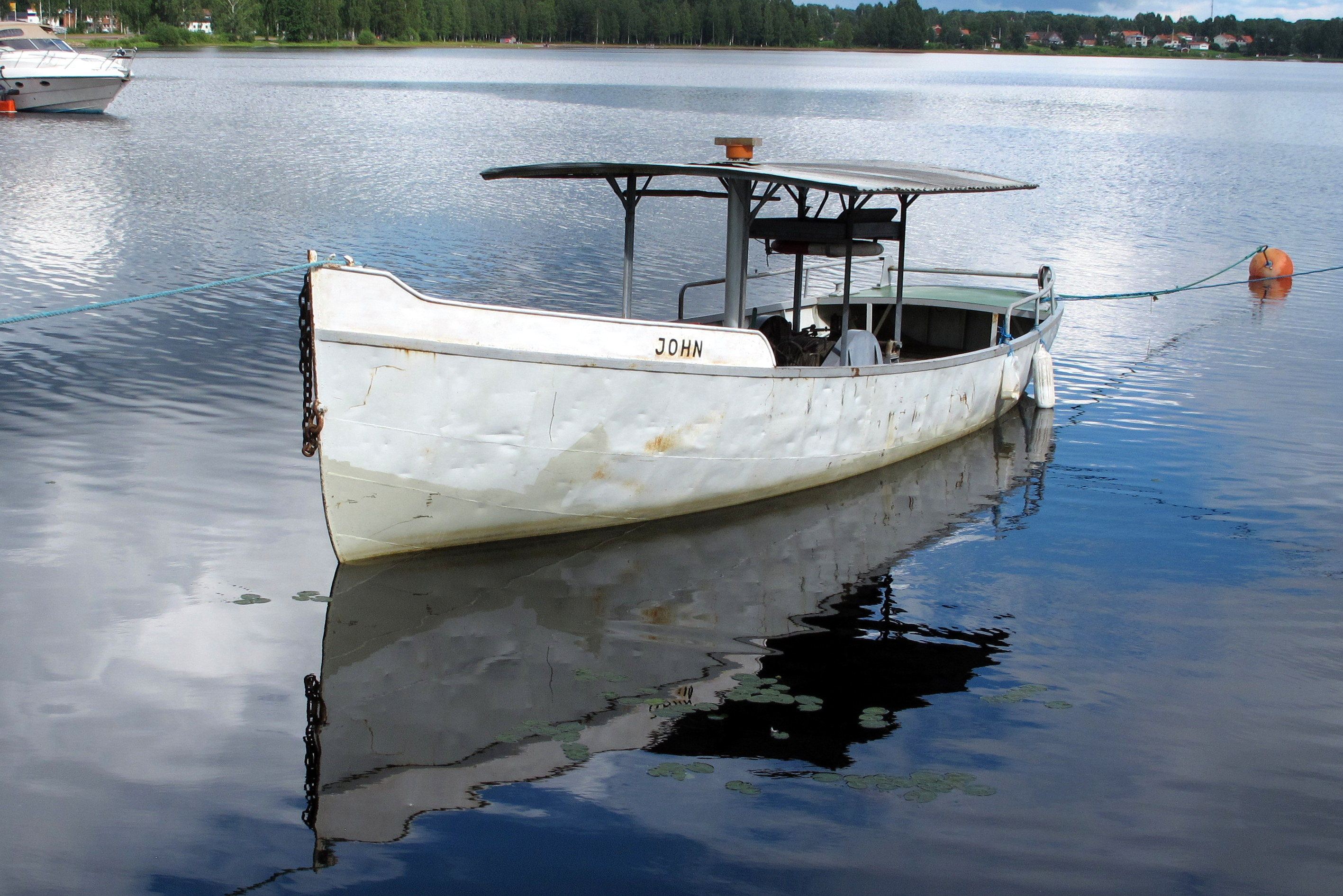 Varpbåten John i Mora